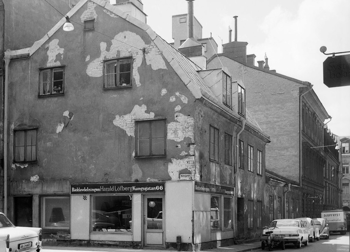 Harald Löfbergs AB, Textilaffär i korsningen Målargatan - Apelbergsgatan